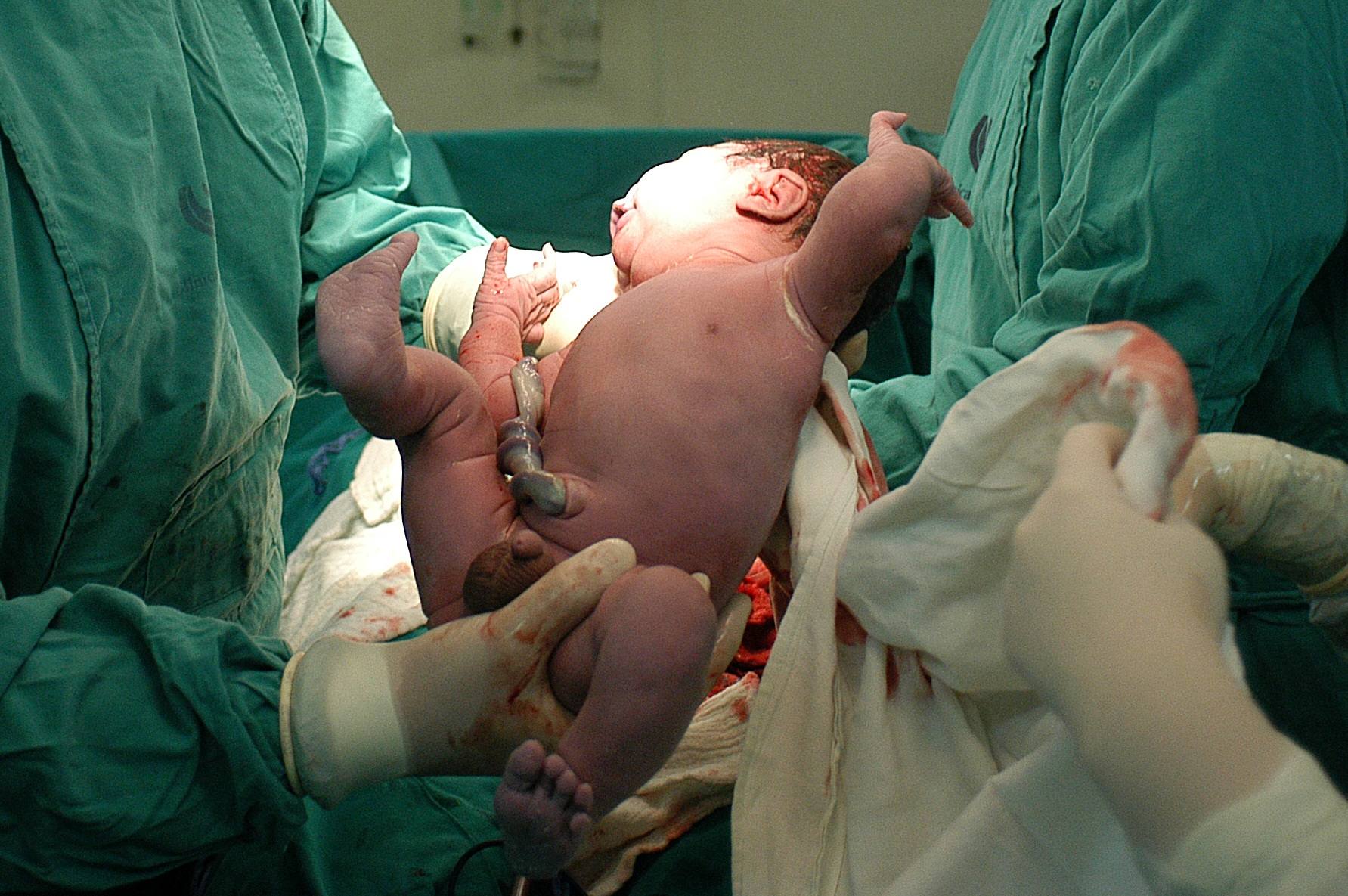 Considera la continuación de los cuidados profesionales en el domicilio, con apoyo telefónico y a la lactancia. En este contexto, la unidad académica inauguró el Diplomado “Nacer en Familia”, orientado a capacitar a profesionales de la salud en la asistencia de un proceso de parto integral, personalizado y seguro.